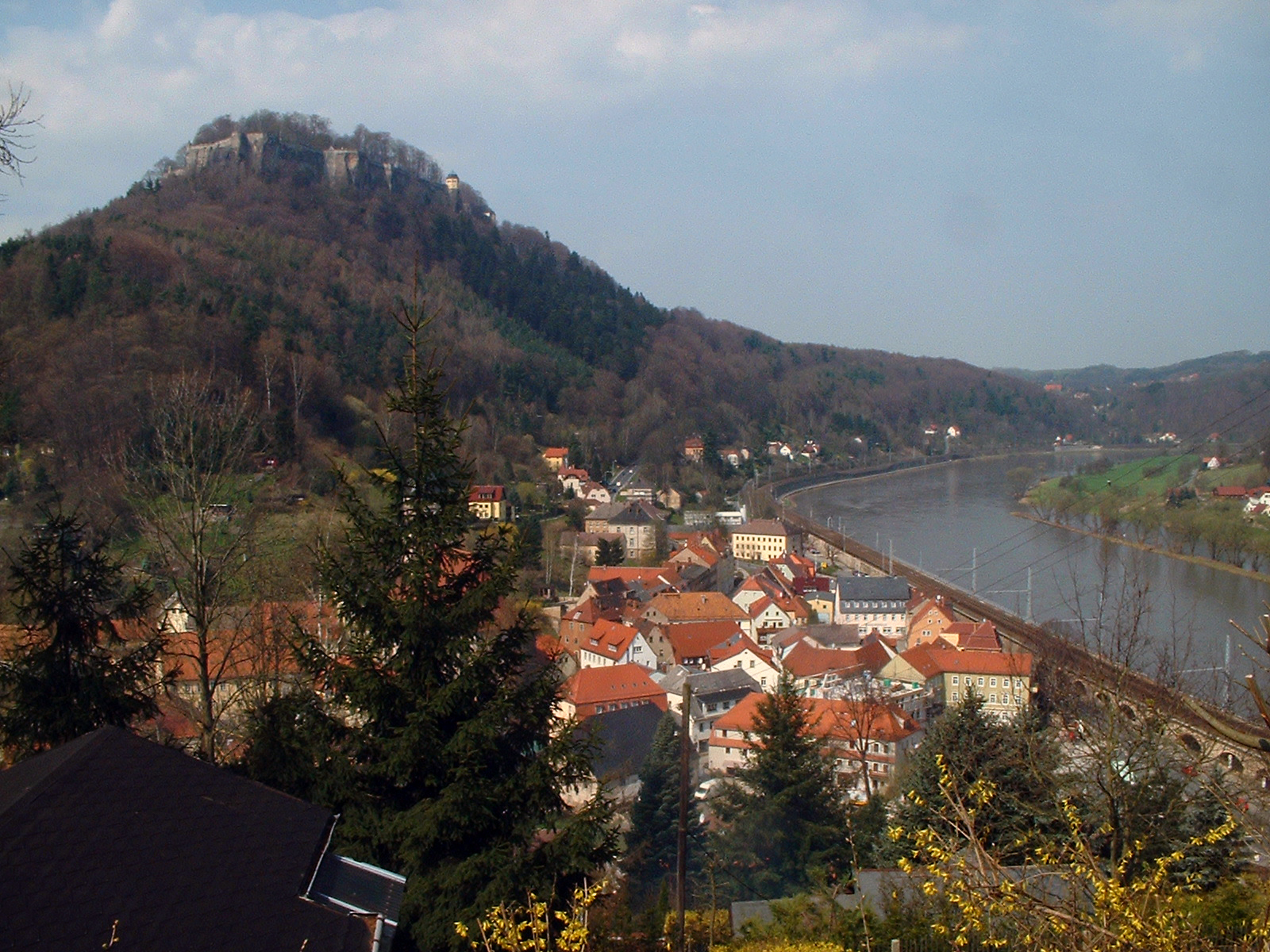 Blick auf Festung und Stadt Königstein an der Elbe in Sachsens - Denkmalschutzgebiet Königstein.